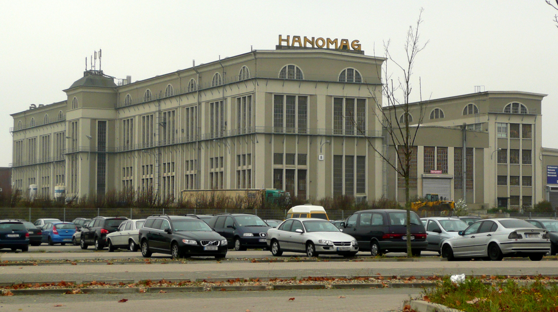 Alte Produktionshalle von Hanomag, heute Komatsu Produktionsgebäude